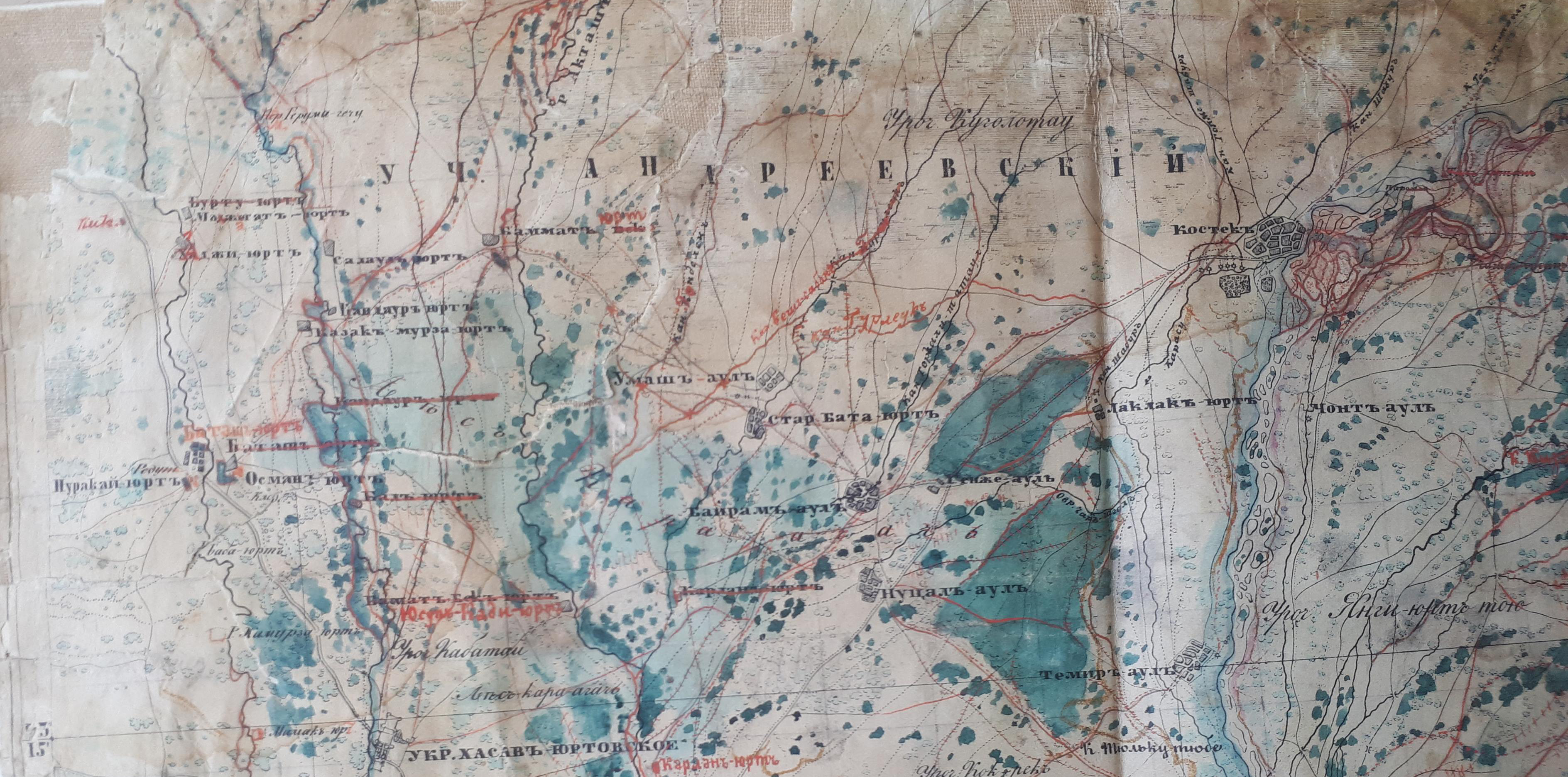 Уч. Андеевский